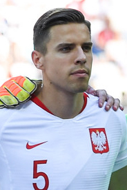 Япония проиграла Польше, но вышла в плей-офф